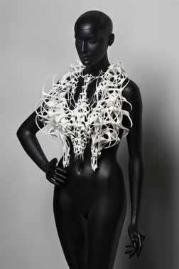 Kunststof (polyamide poeder); gemaakt door middel van 3D printtechniek Selective Laser Sintering. In opdracht van het museum vervaardigd, 2011.